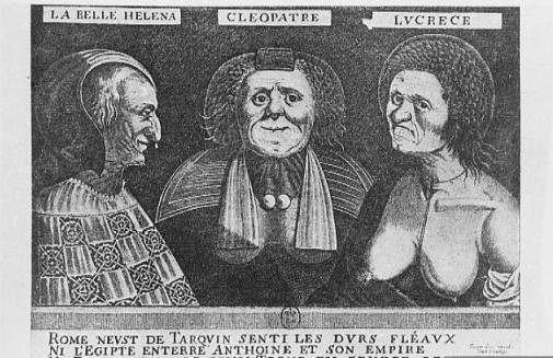 Gaspard Isaac Les Trois Belles (Hélène, Cléopâtre et Lucrèce) c. 1650